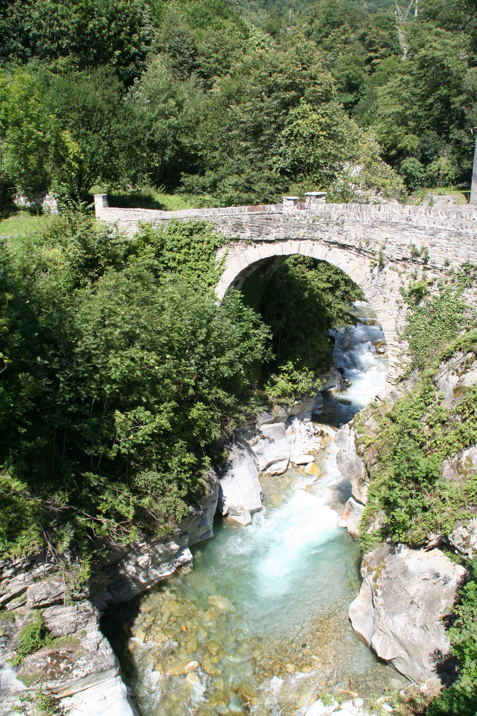 Bondo GR: Brücke bei Promontogno